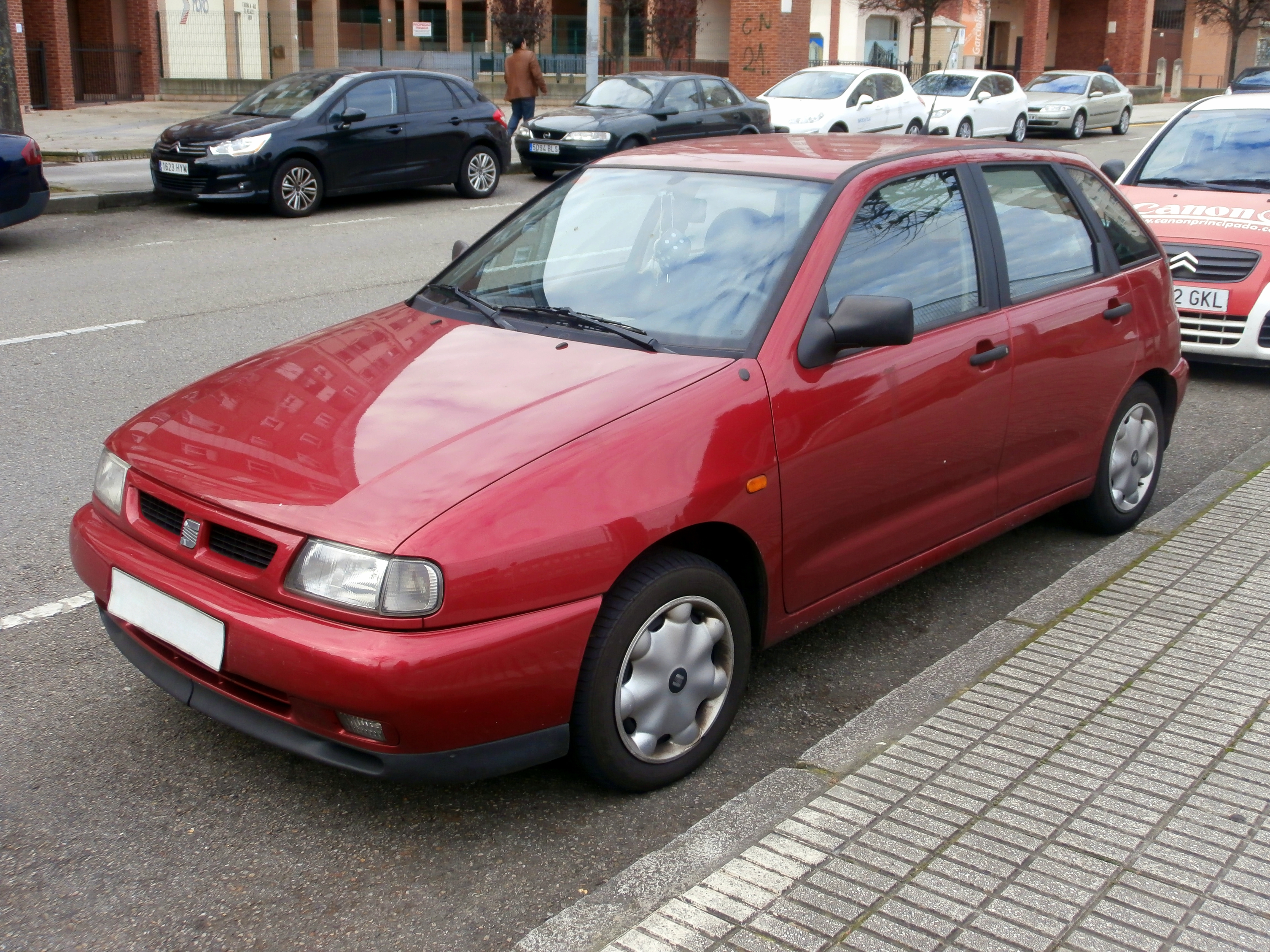 SEAT Ibiza II GLX 3-4 Frontal 1995